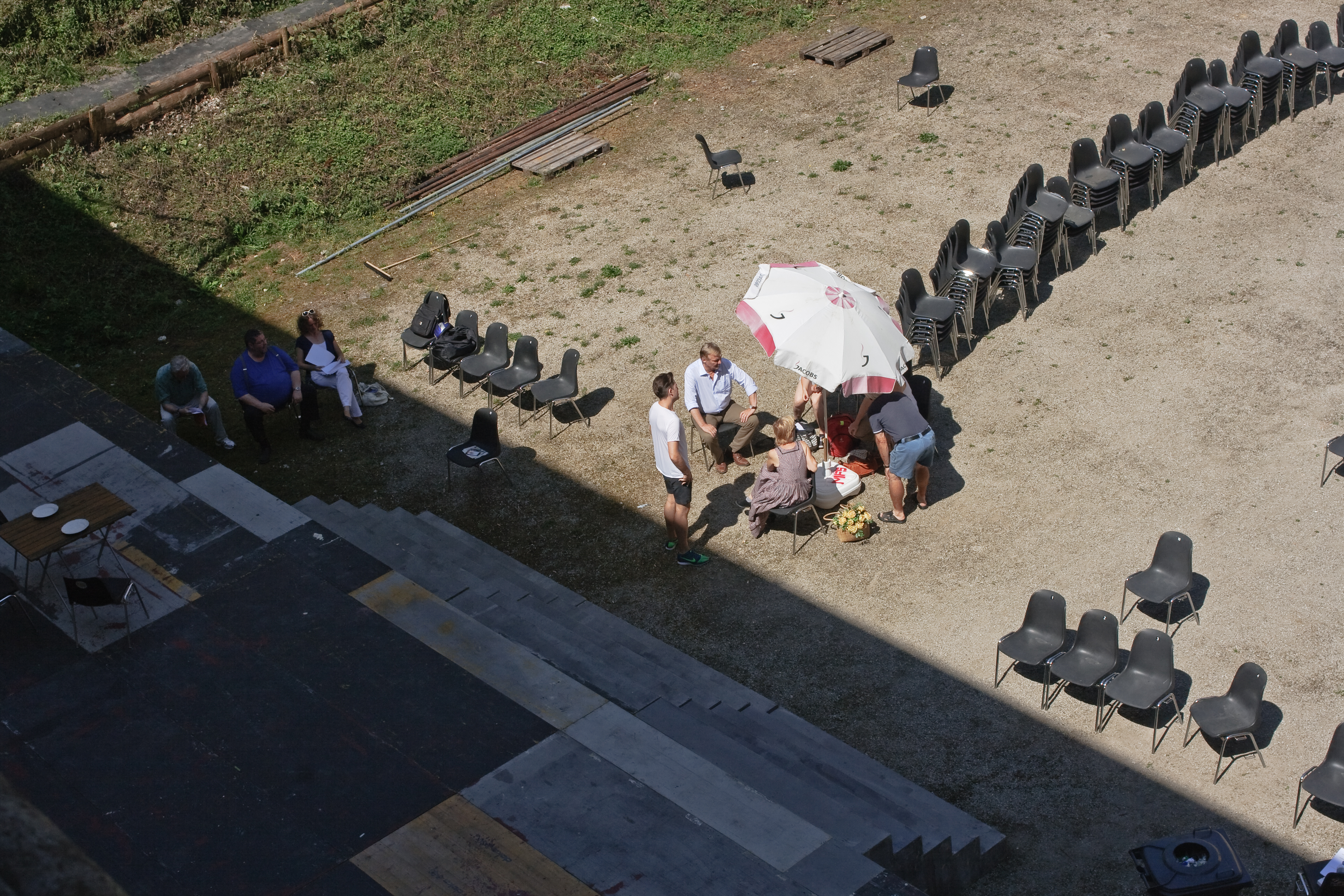 Musikfestival Steyr: Proben zu der Operette „Im weißen Rössl” im Graben von Schloss Lamberg